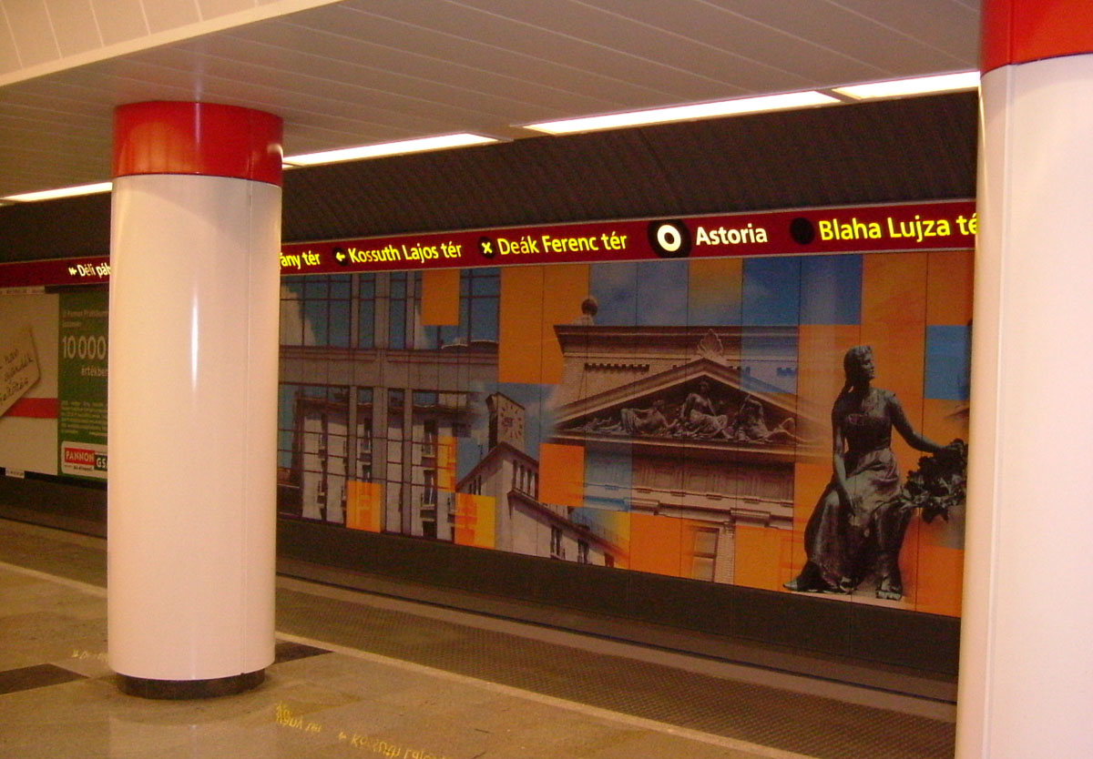 Metro, Budapest